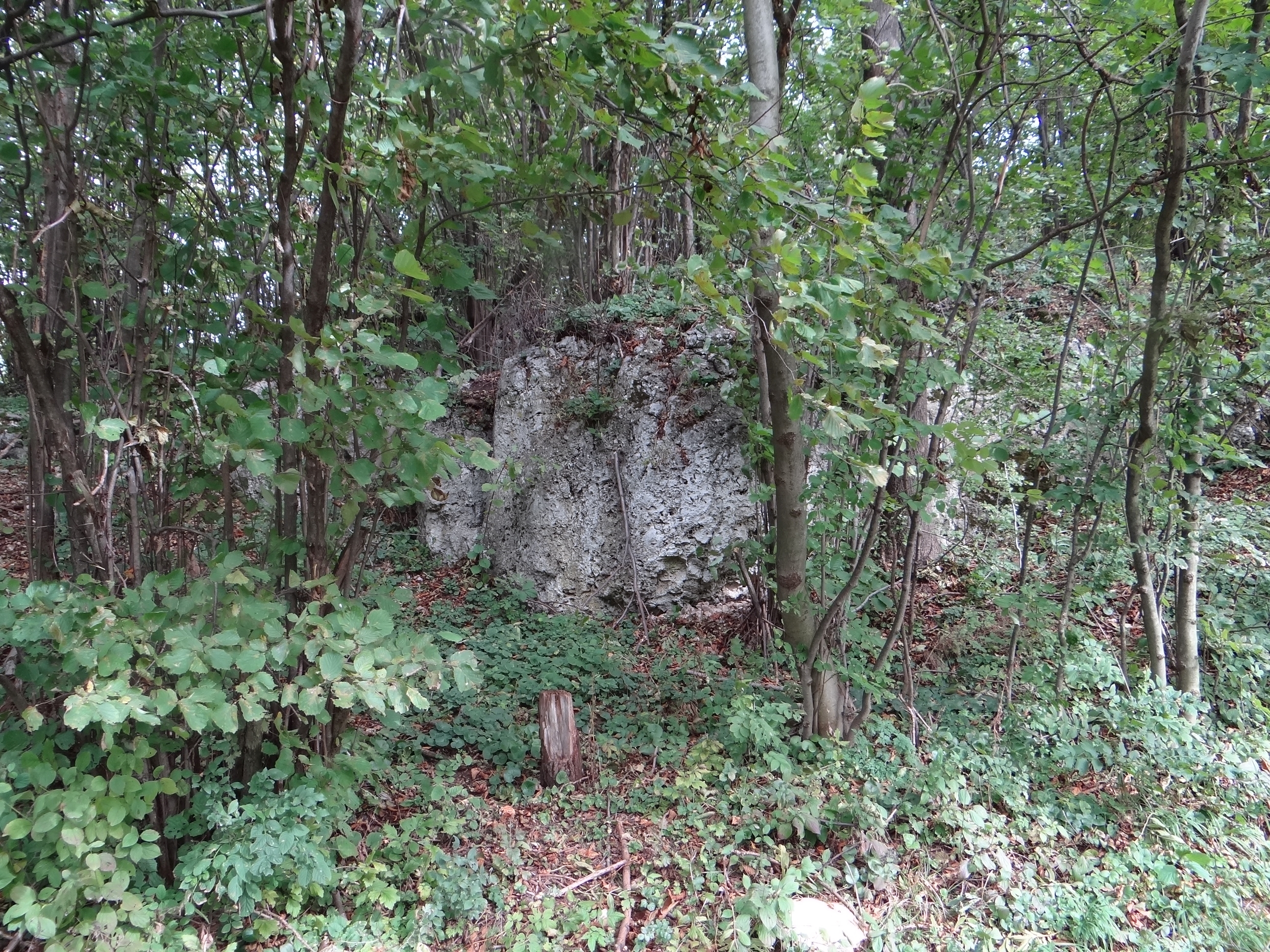 Skałka wapienna na Małej Skałce we wsi Bębło